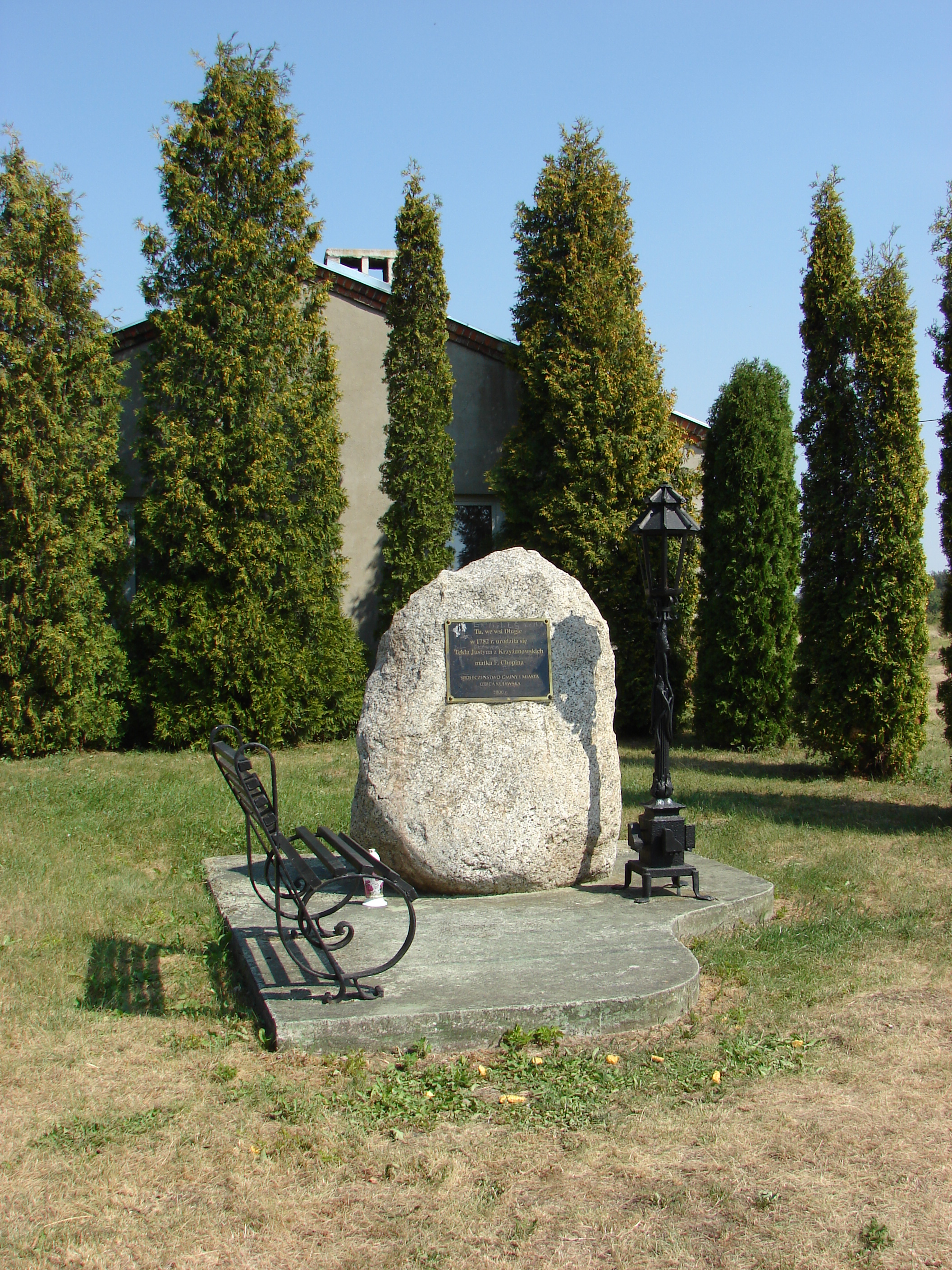 Długie, Gmina Izbica Kujawska, kamień Krzyżanowskiej